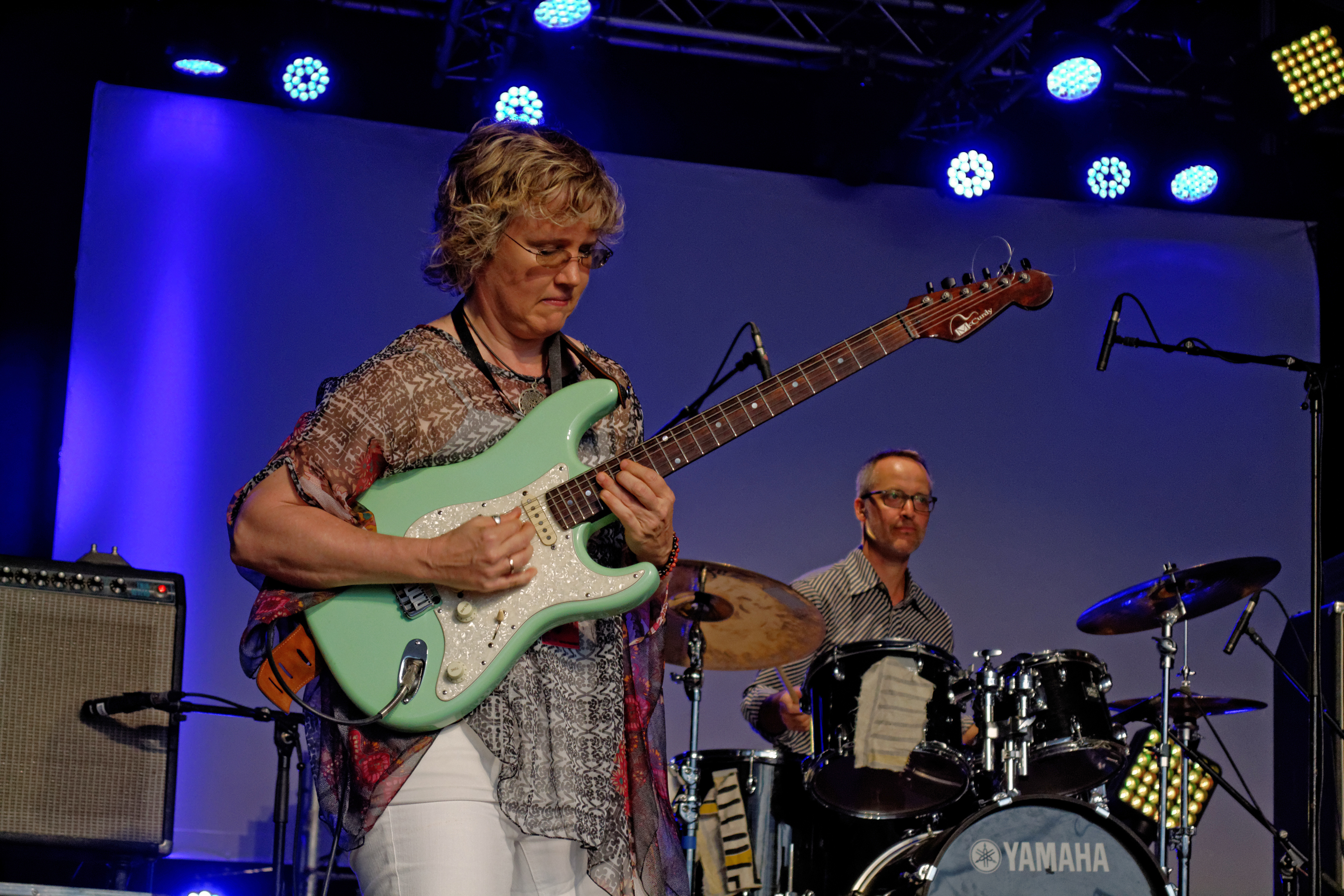 Sheryl Bailey avec David Krakauer en concert à l'espace Pierre Jakez Hélias lors du festival de Cornouaille le 24 juillet 2014.